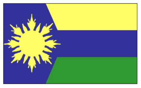 Bandera de Socopó